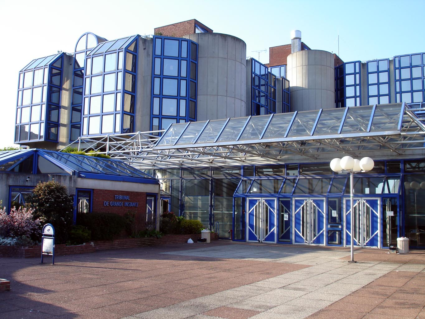 Entrée du Tribunal de Grande Instance de Bobigny (Seine-Saint-Denis), France